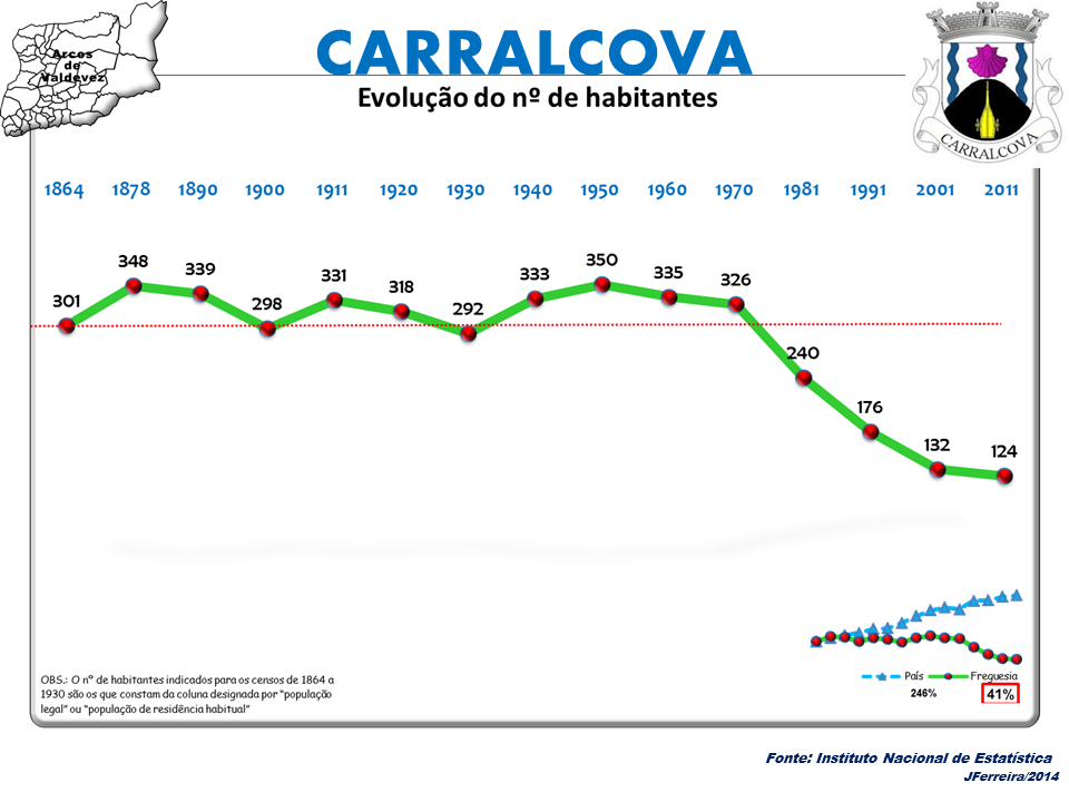 Censoa 1864/2011